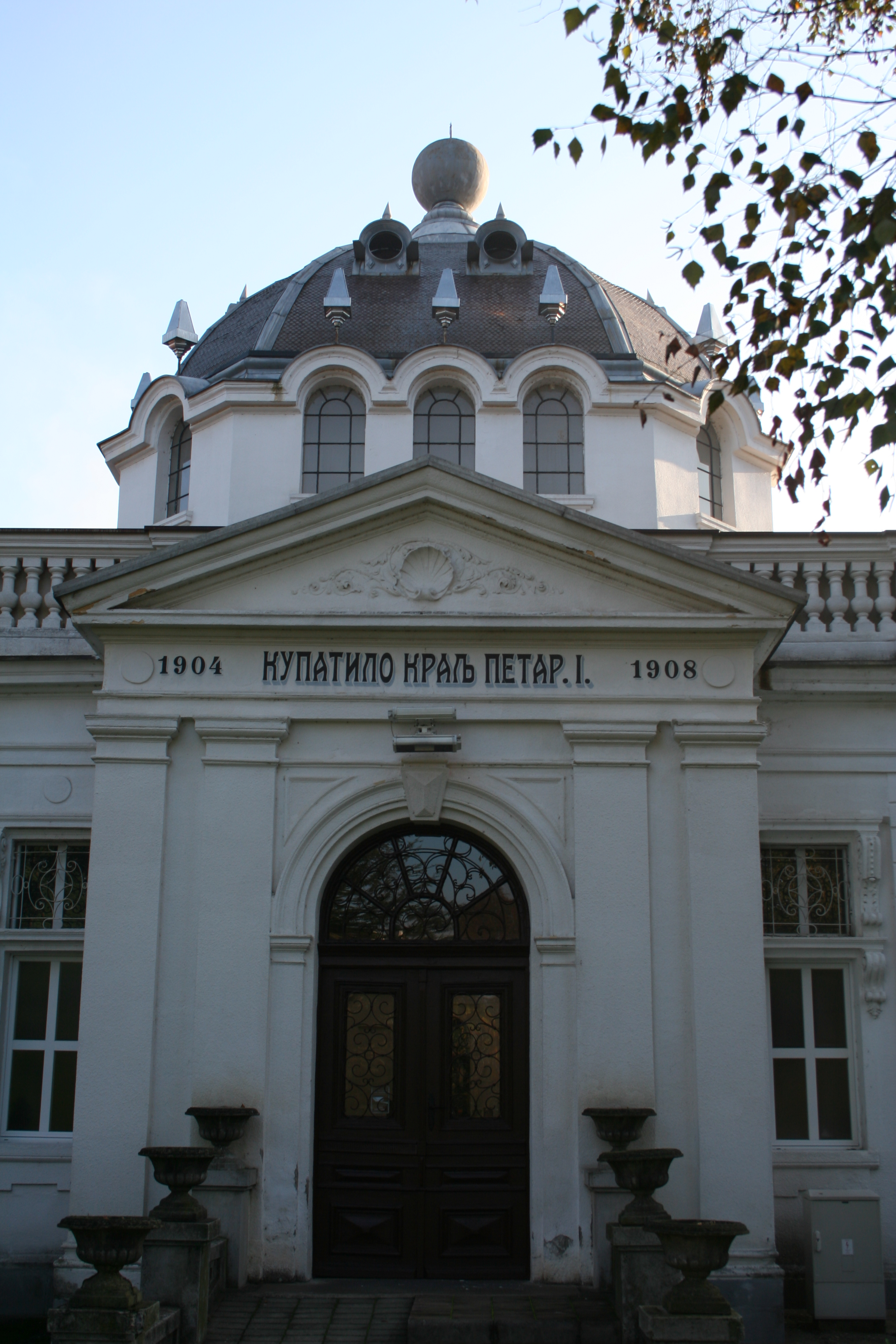 Specijalna bolnica za rehabilitaciju Banja Koviljača